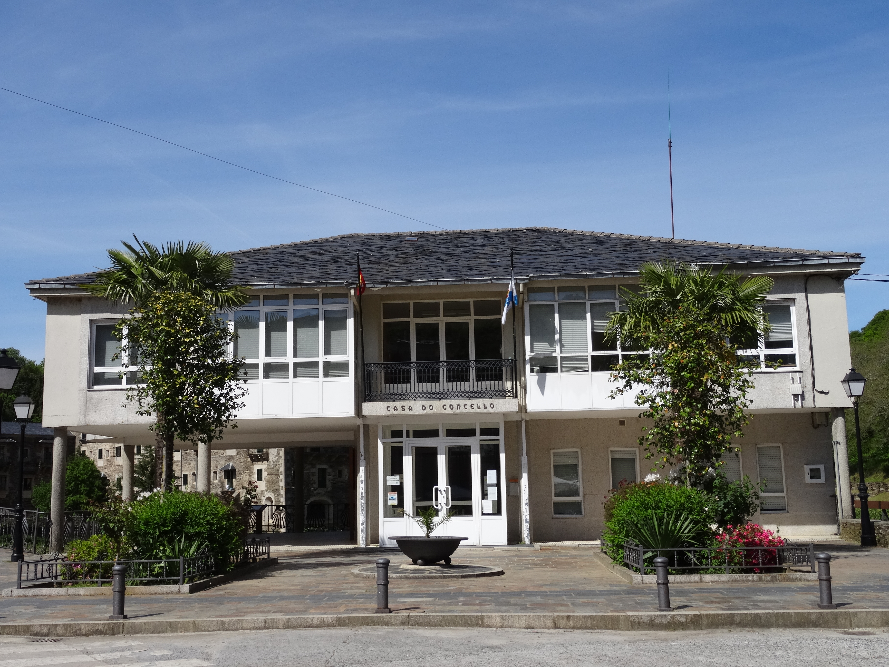 Casa do concello de Samos.